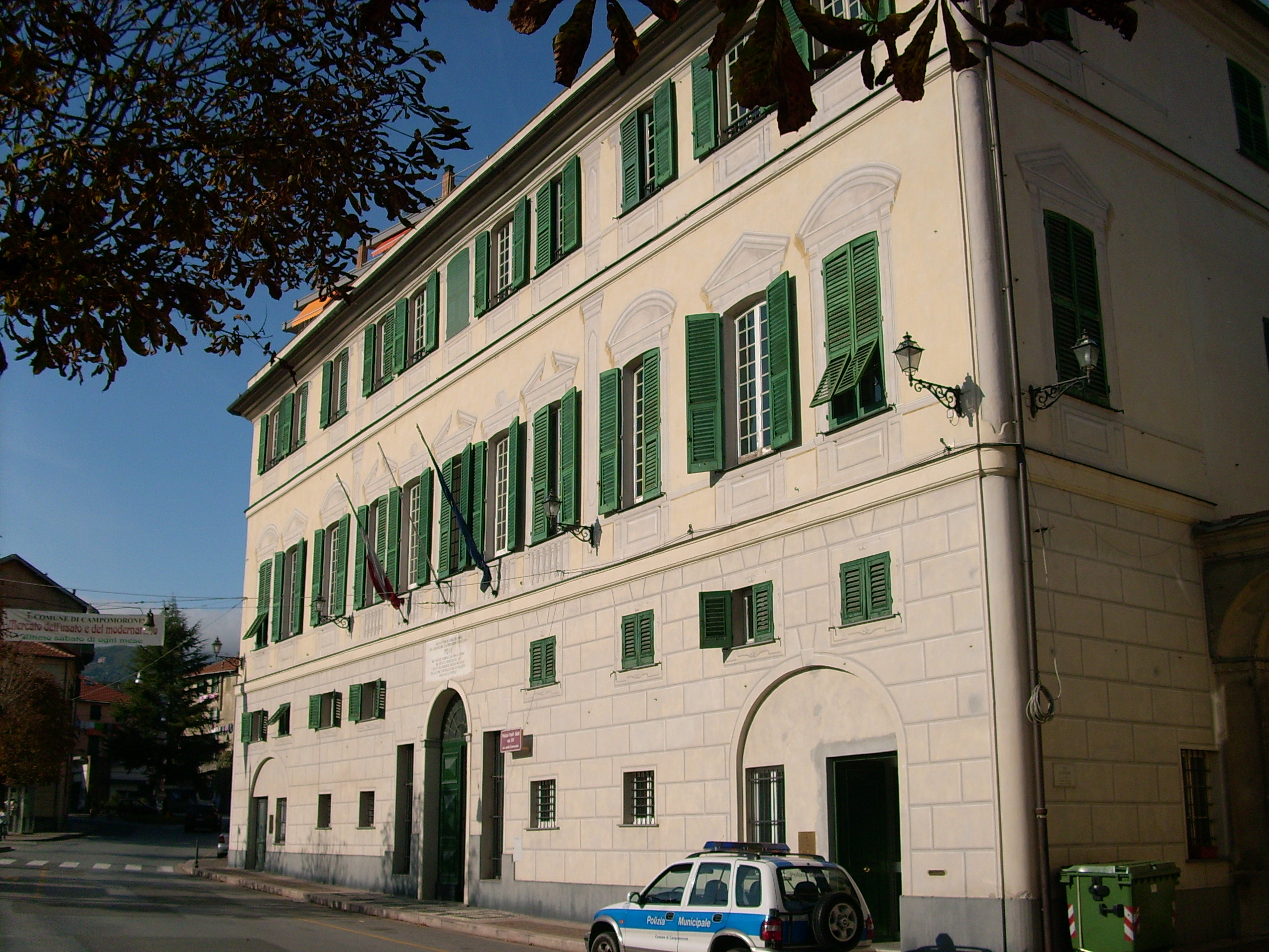 Palazzo Balbi, Campomorone, Liguria, Italia